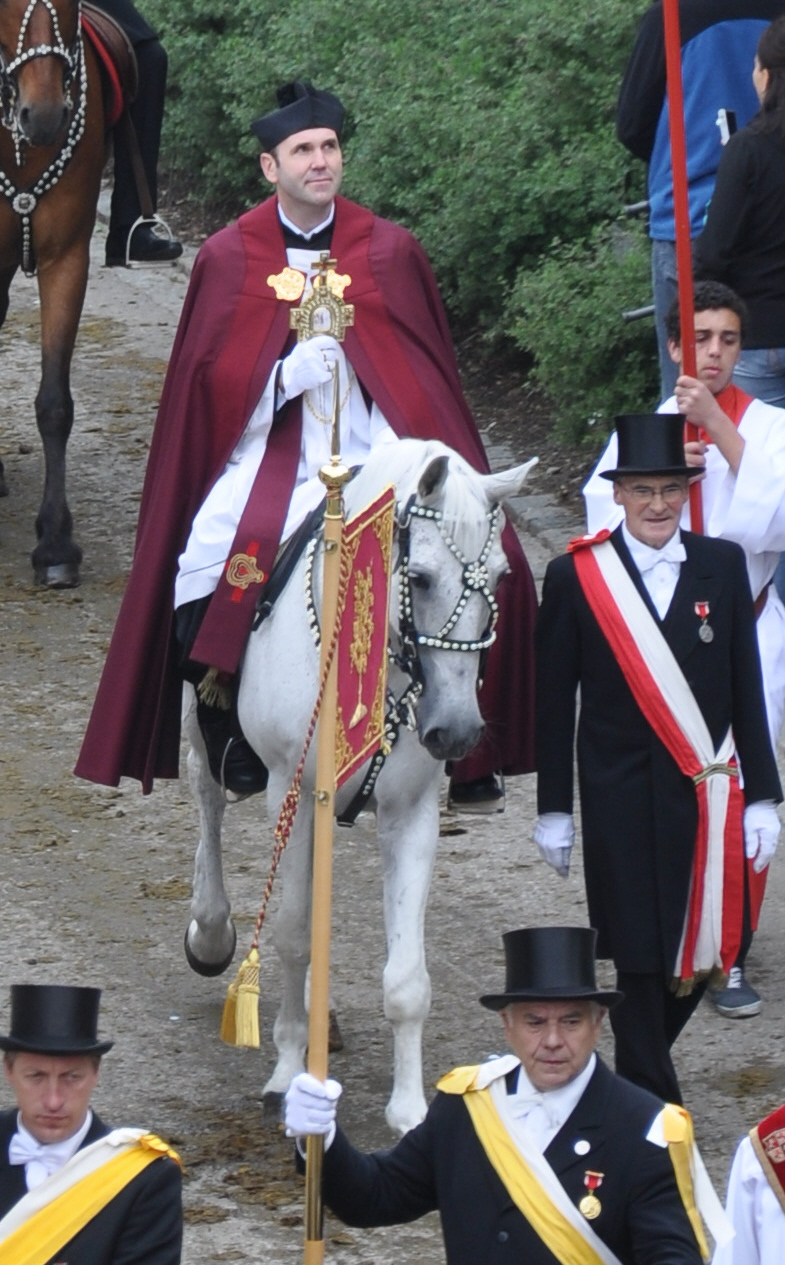 Weingarten, Blutritt 2011, Der Heilig-Blut-Reiter (Pfarrer Ekkehard Schmid (ehemaliger Pfarrer in Rot an der Rot) mit der Heilig-Blut-Reliquie)